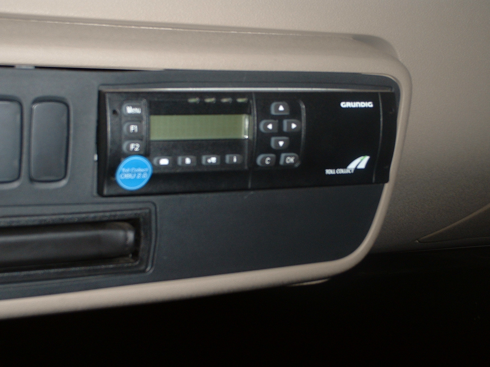 mautkast